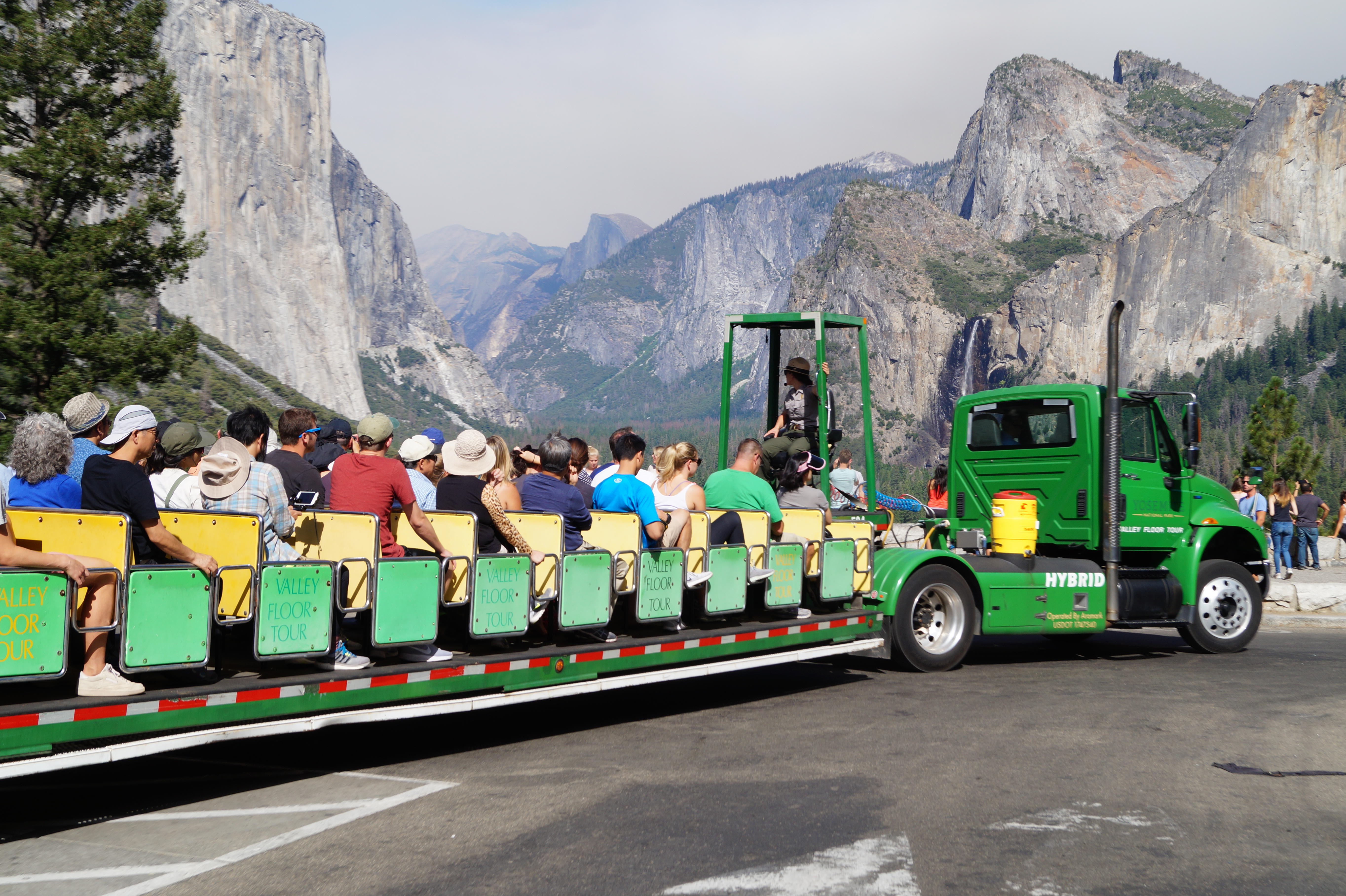 Yosemite Valley Floor Tour at Tunnel View overlooking Yosemite Valley, in Yosemite National Park, California.